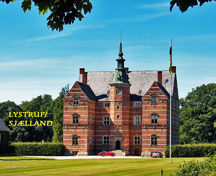 fra syd